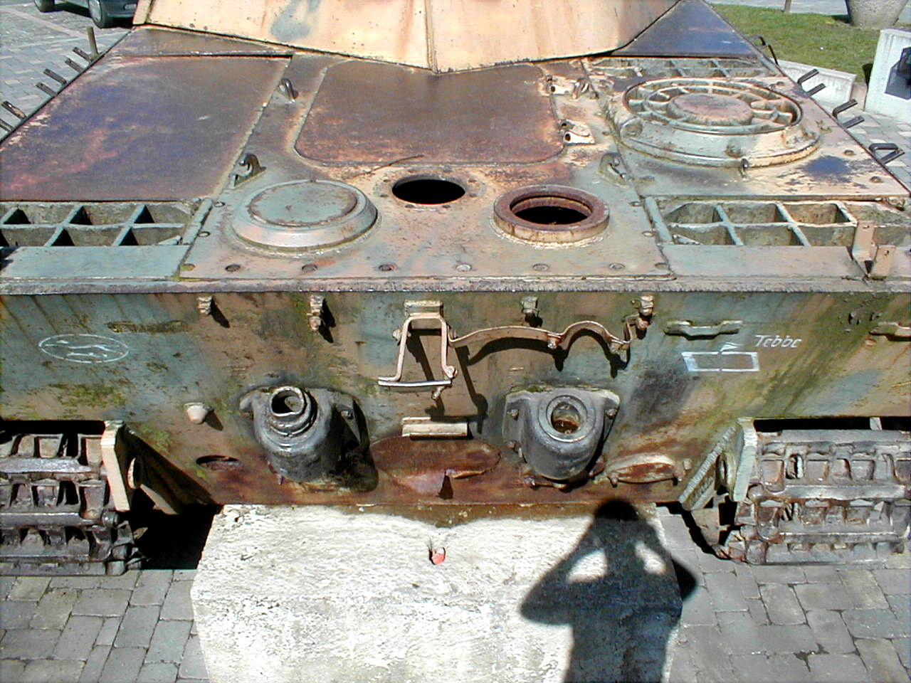 Char Panther V se trouvant à Houffalize